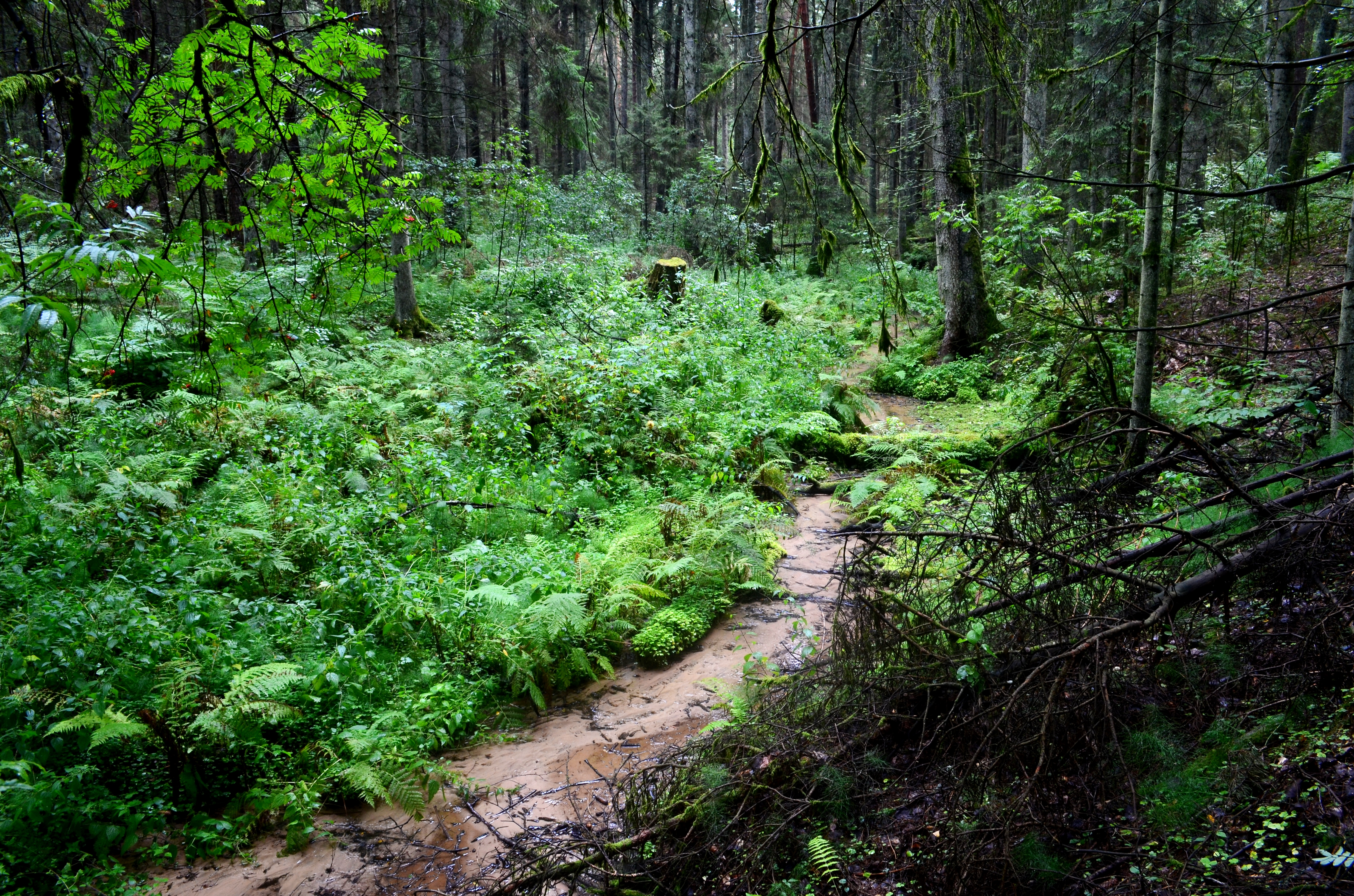 Iš Lekėčių šaltinio ištekąs upelis, Šakių raj.